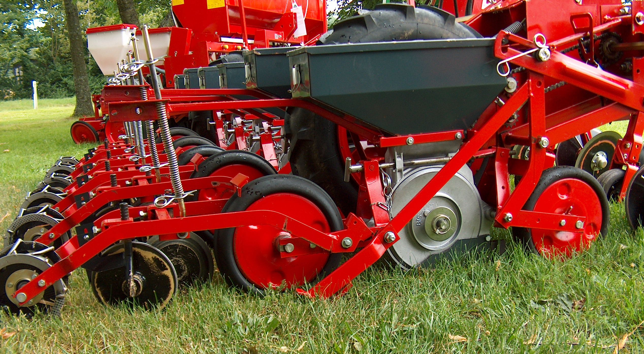 Detailansicht eines Zuckerrübensägeräts (File:Zuckerrübeneinzelkornsägerät.jpg)